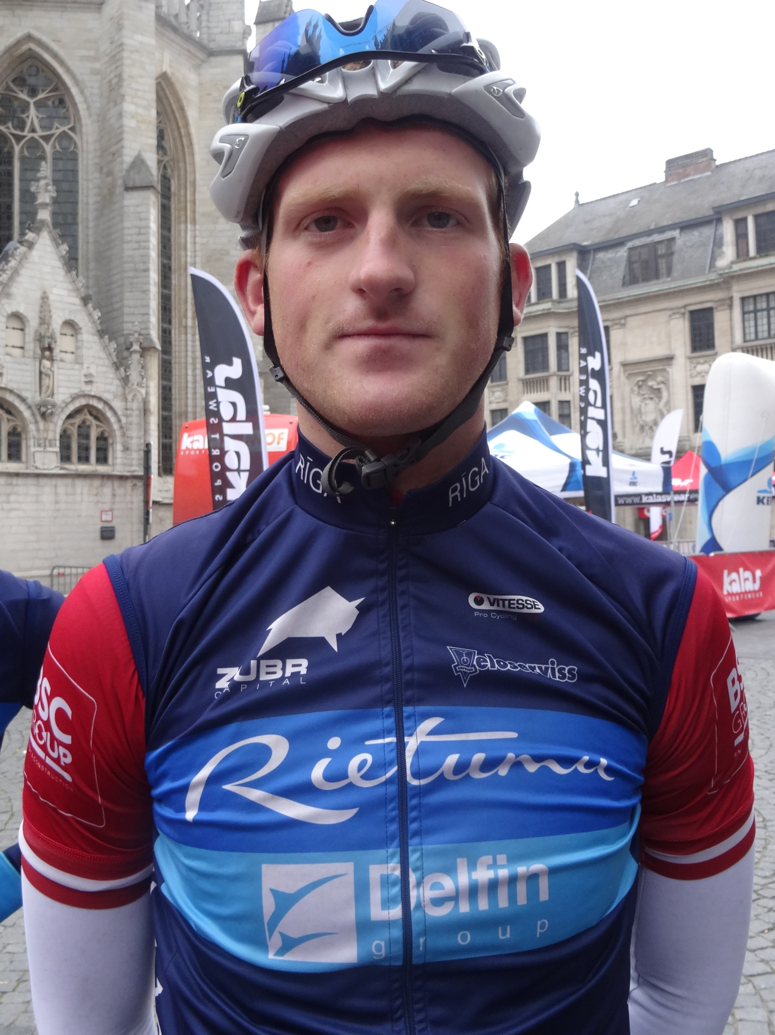 Reportage photographique réalisé le dimanche 14 septembre à l'occasion du départ et de l'arrivée du Grand Prix Jef Scherens 2014 à Louvain, Belgique.